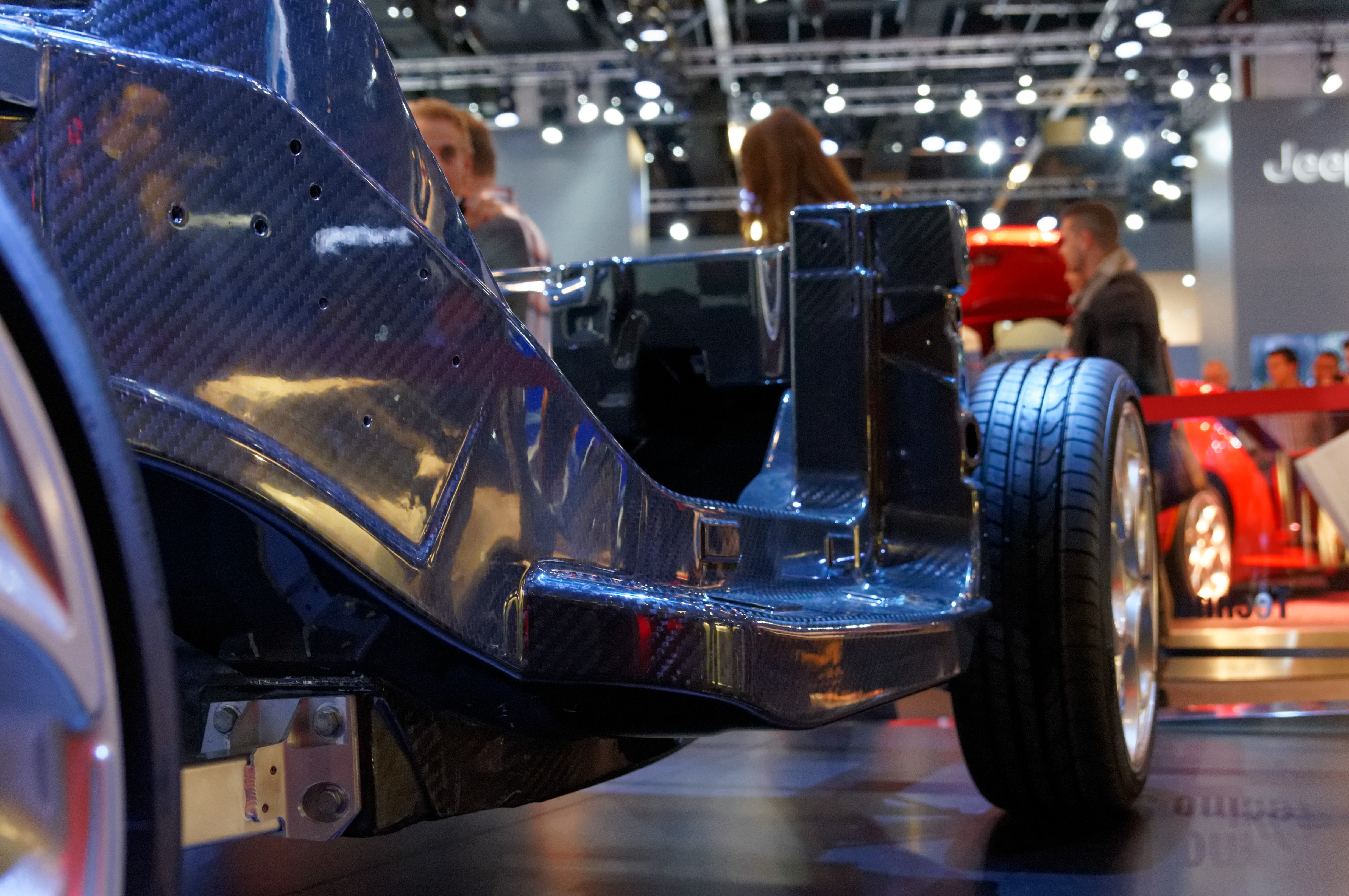 Il telaio della Alfa Romeo 4C, supercar italiana ad alte prestazioni: Monoscocca in fibra di carbonio con telaio in alluminio